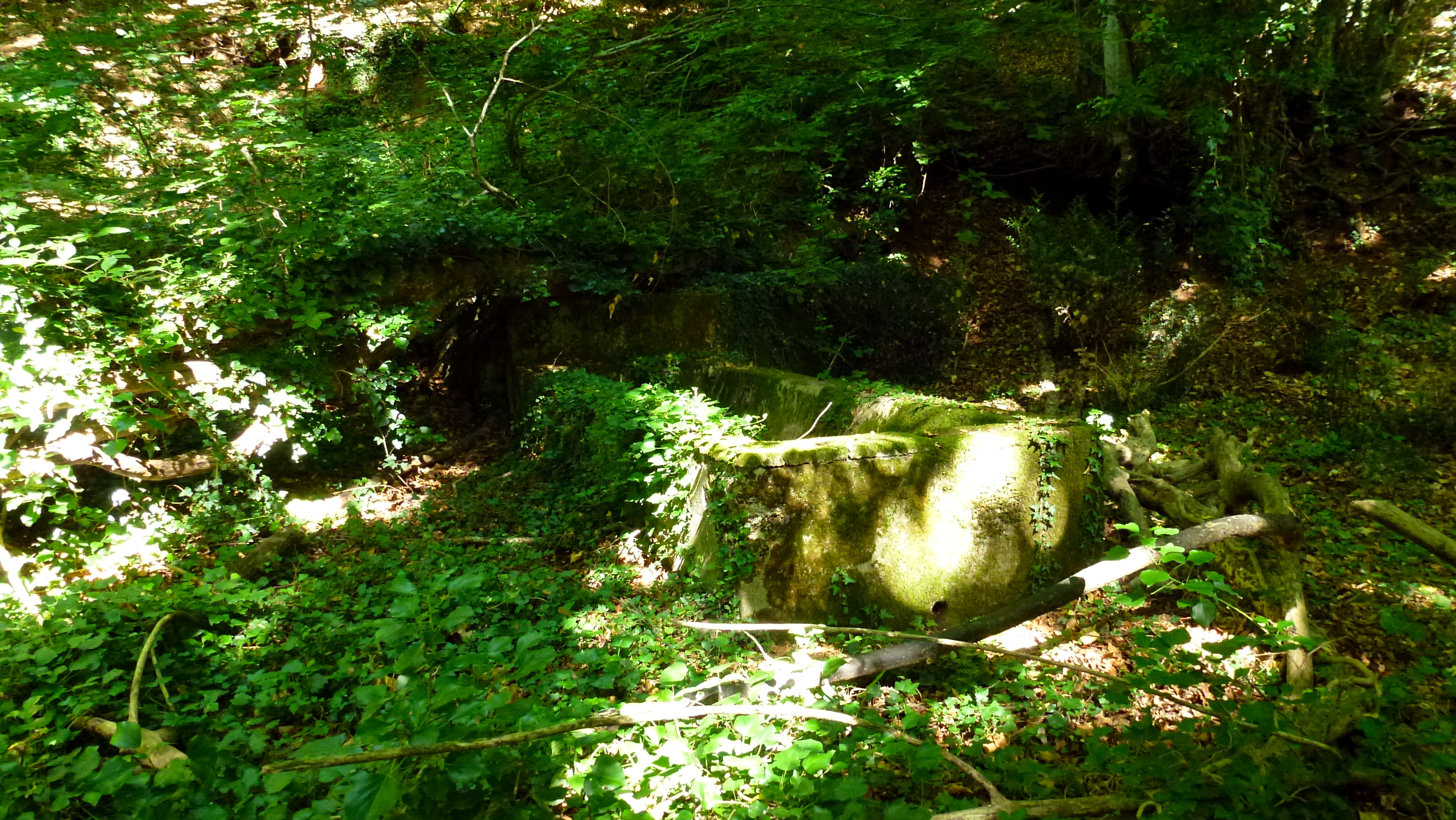 Fonte Petrella nella faggeta vetusta depressa di Monte Raschio